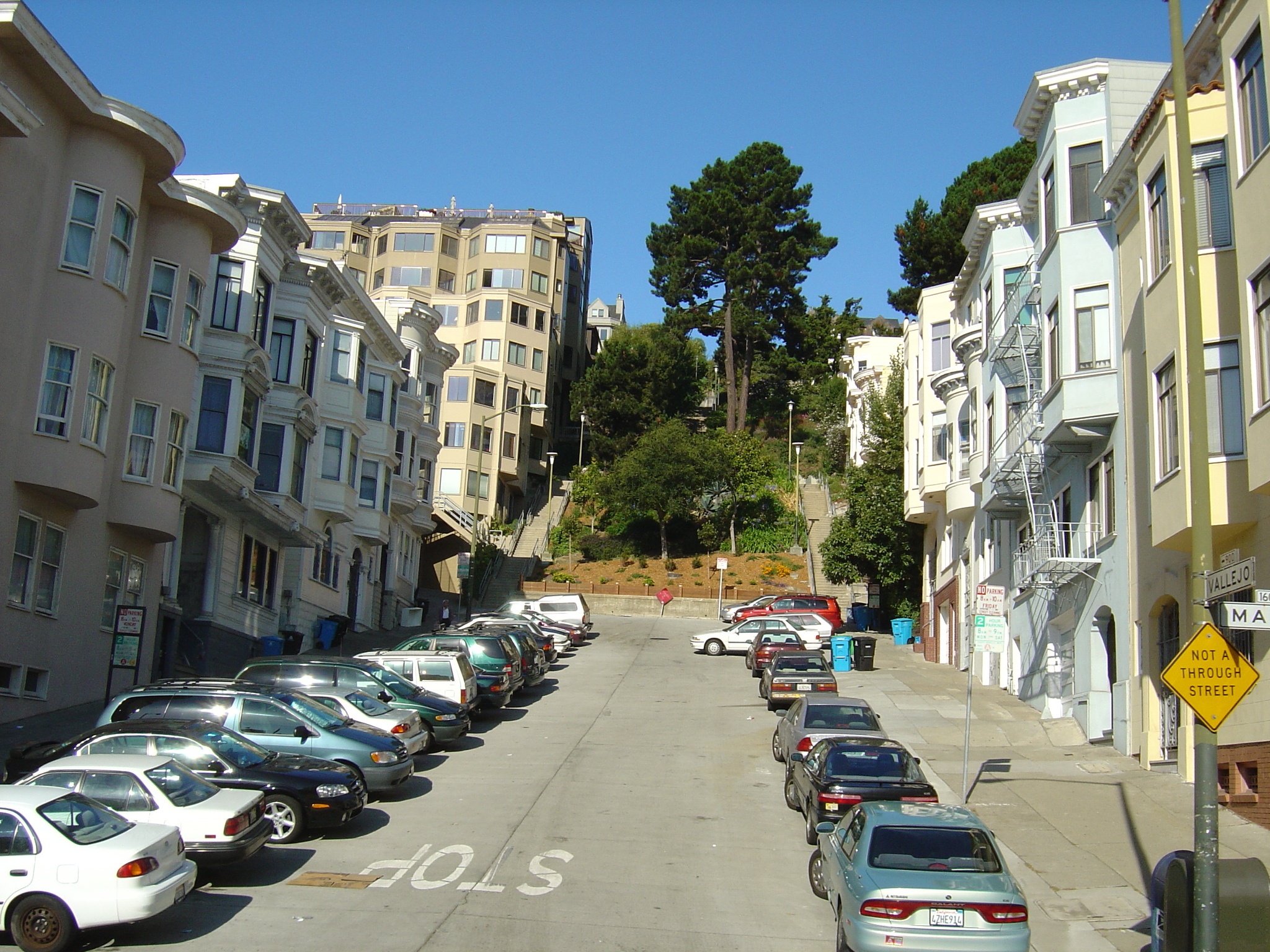 typischer Häuser Stil in San Francisco . Vallejo Street and Mason Street, Russian Hill, San Francisco.